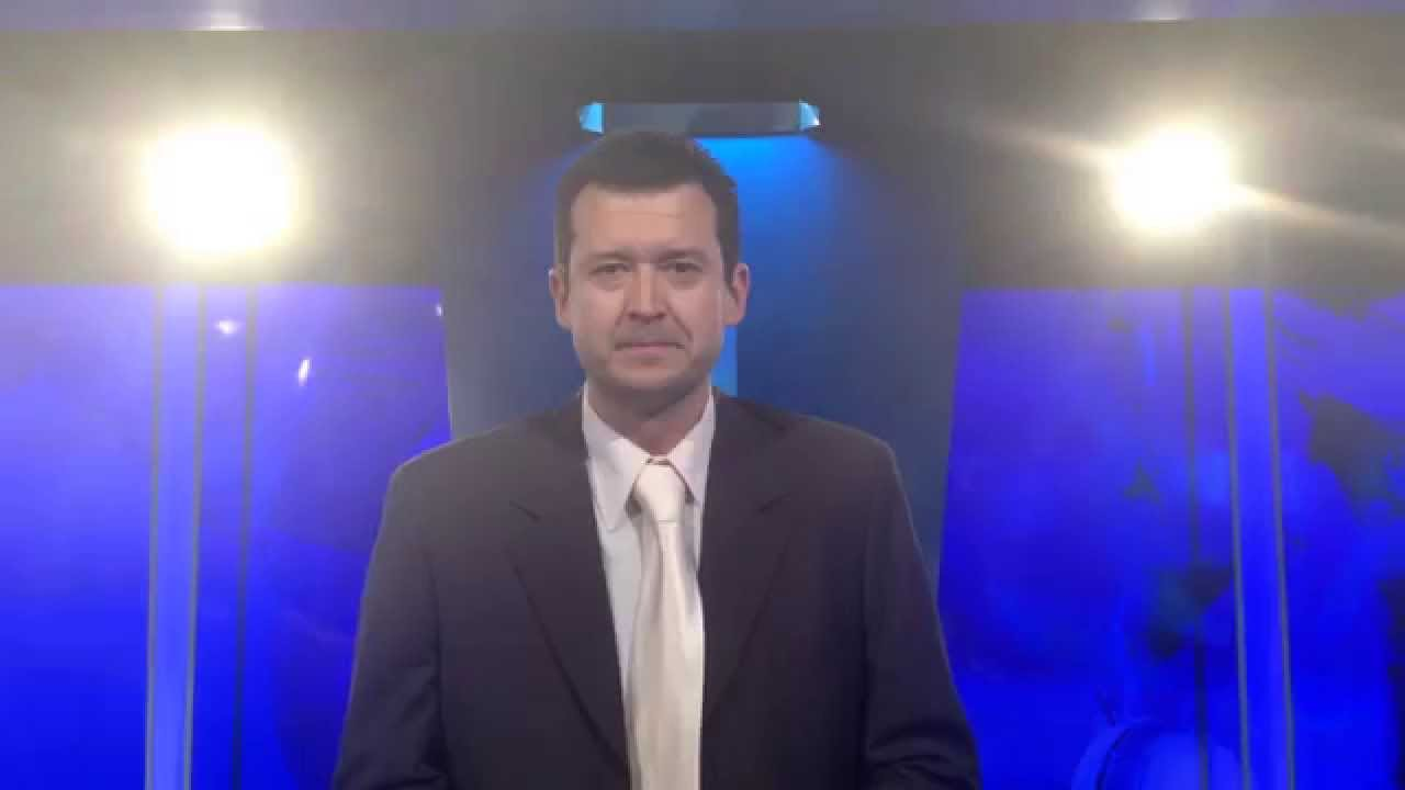 Juan Furlanich en 2015.